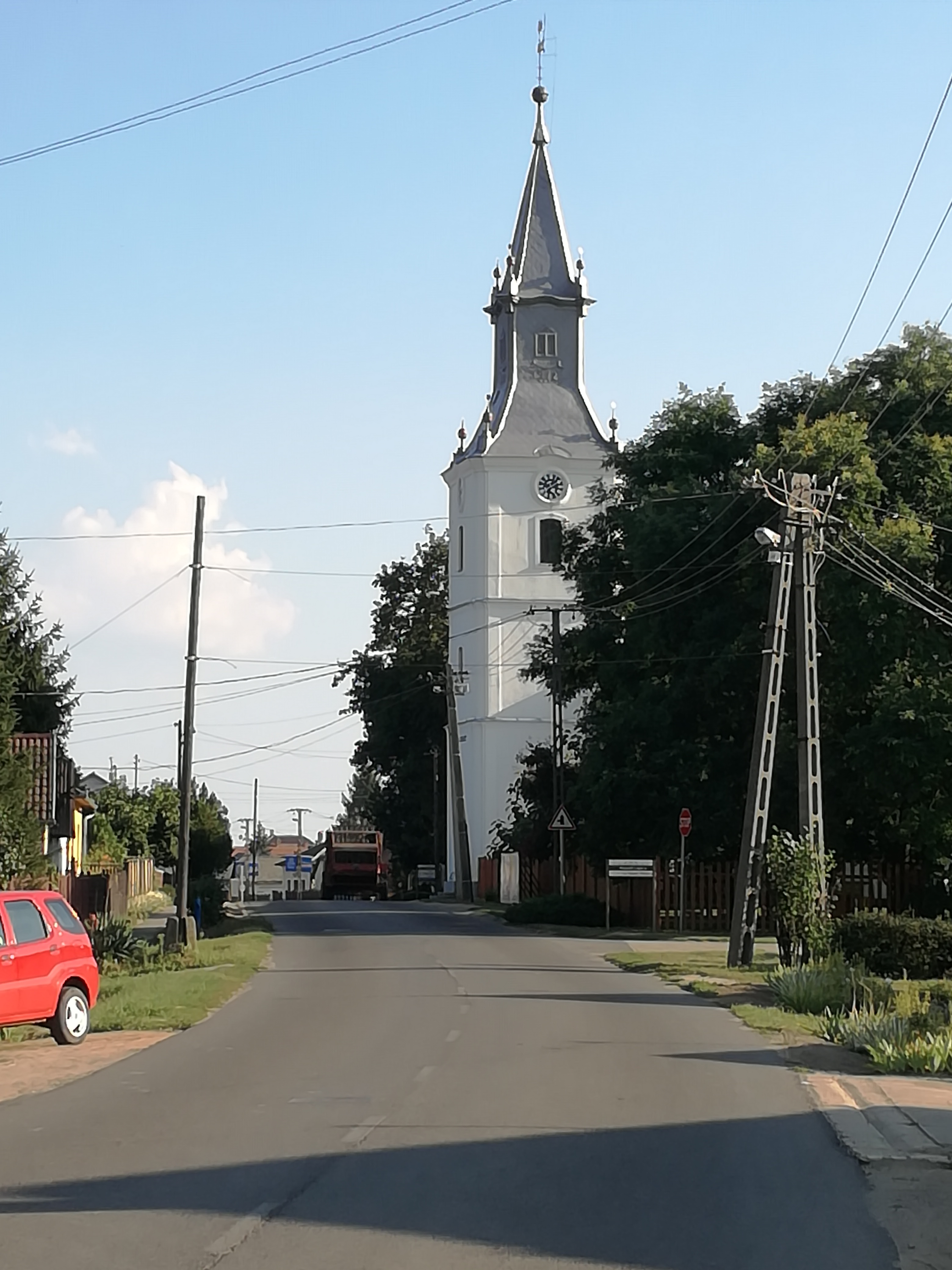 patrohai református templom